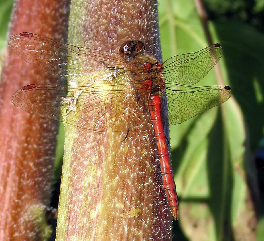 Beschreibung: Große Heidelibelle (Sympetrum striolatum) / Männchen Fotograf: Darkone, 9. September 2004